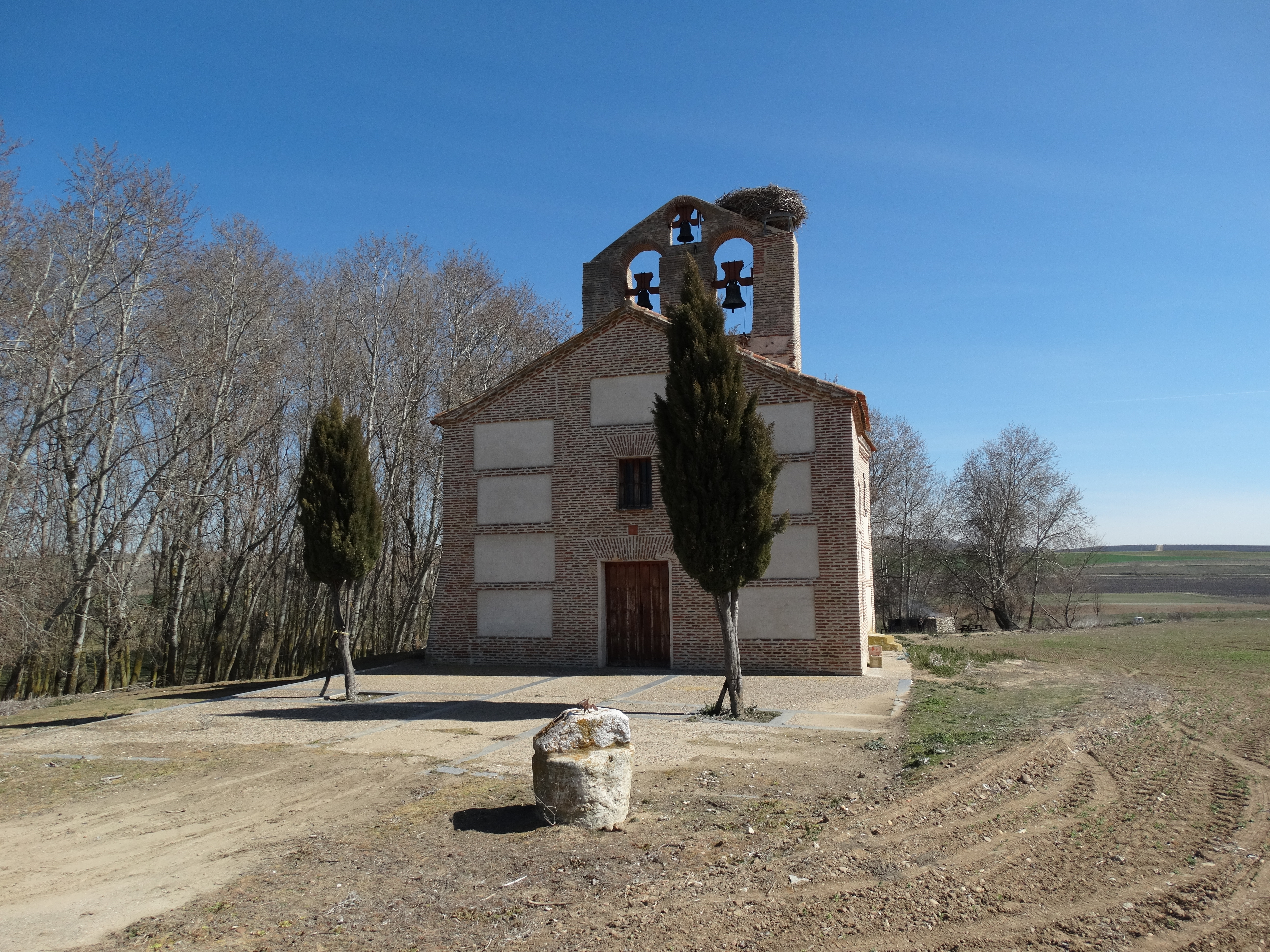 Carrioncillo, (provincia de Valladolid, España), un lugar despoblado, ubicado a orillas del río Zapardiel, que perteneció a la Tierra de Medina. Hubo un palacio en la Edad Media donde se crió y pasó sus años de mocedad el rey Alfonso V de Aragón. En el siglo XXI sólo queda en pie la ermita recientemente restaurada.